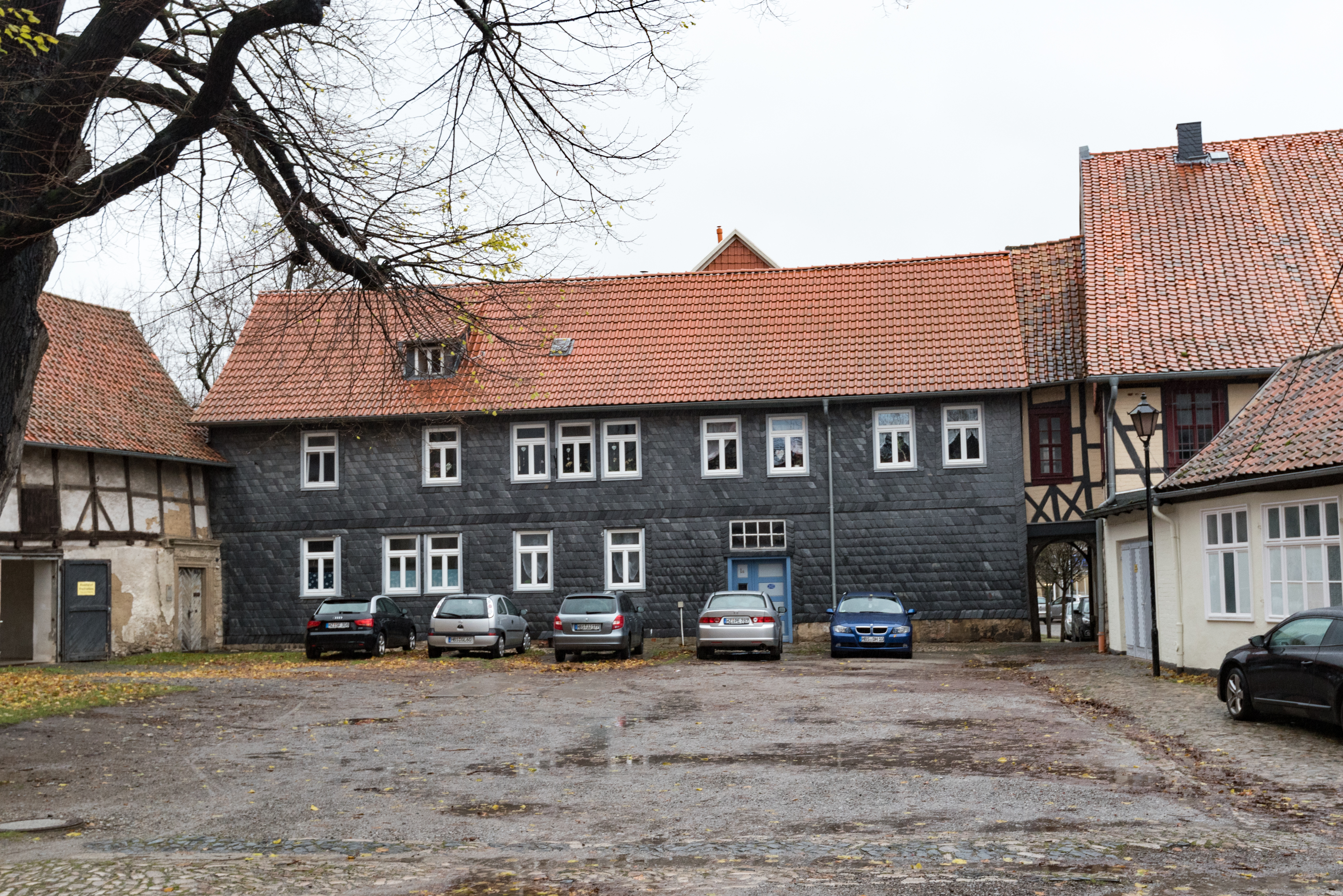 Osterwieck, Am Markt 1A, Ansicht Stephanikirchplatz